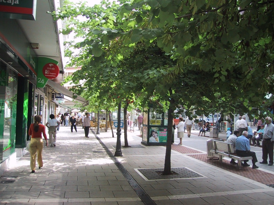 Innenstadt von Estepona